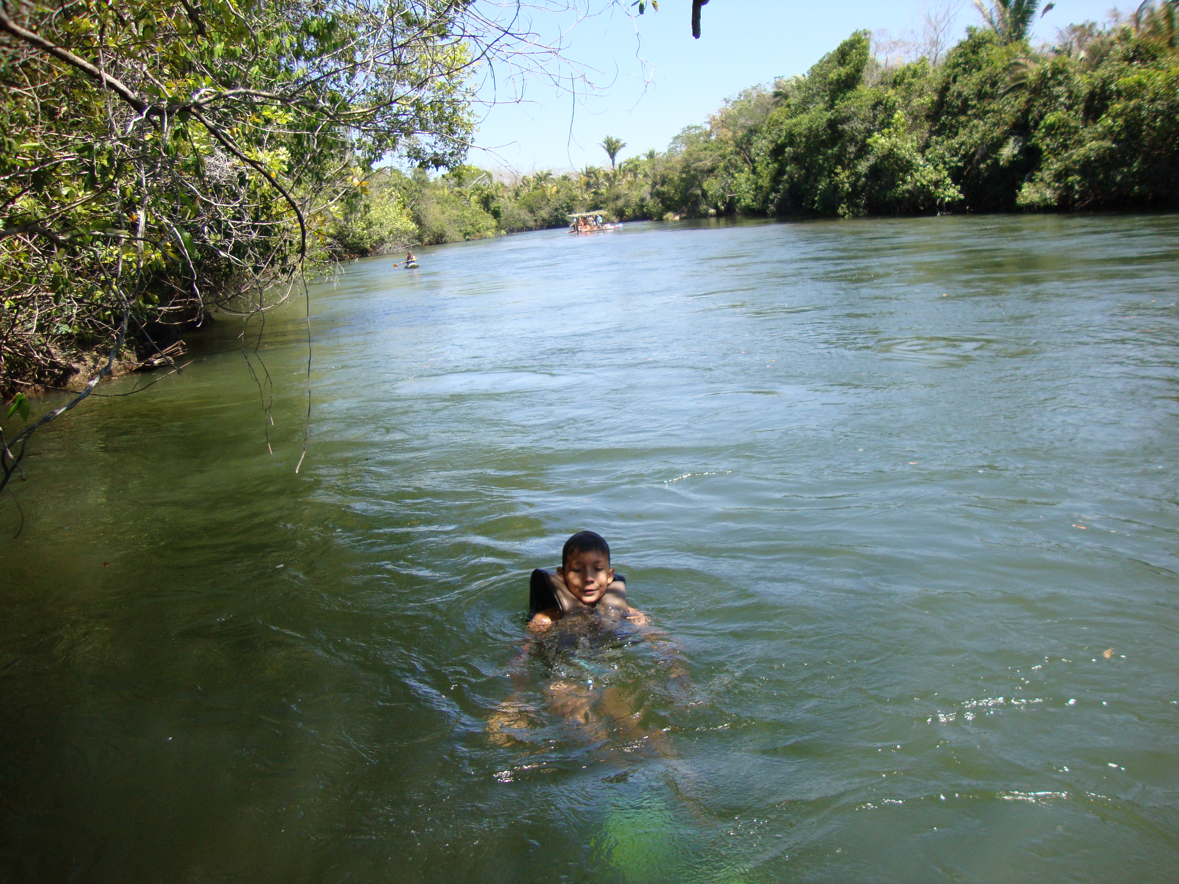 Foto do rio balsas e suas belezas.